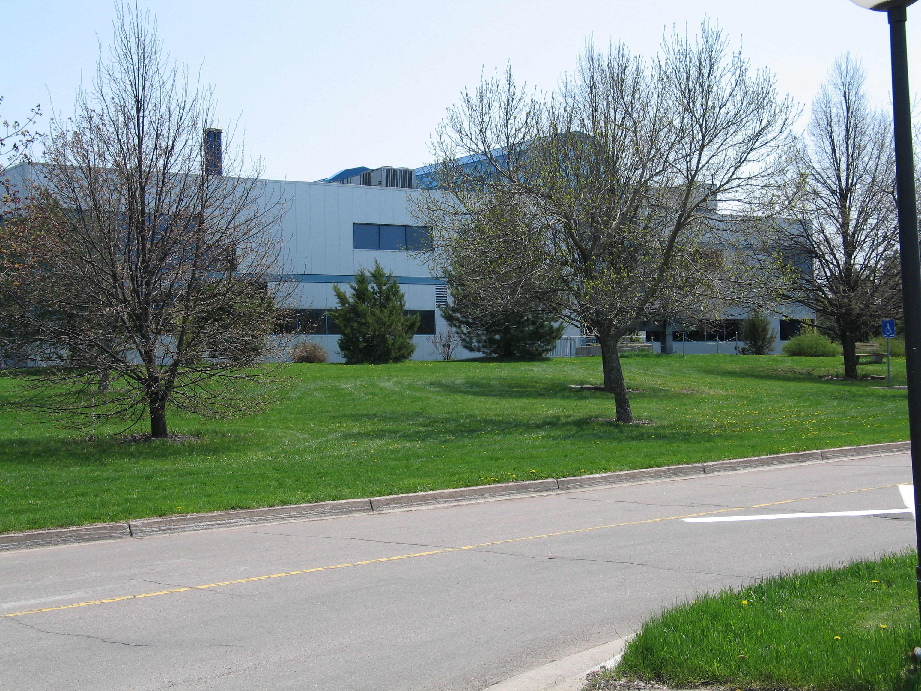 L'édifice de la faculté d'ingénierie de l'Université de Moncton, sur le campus de Moncton.